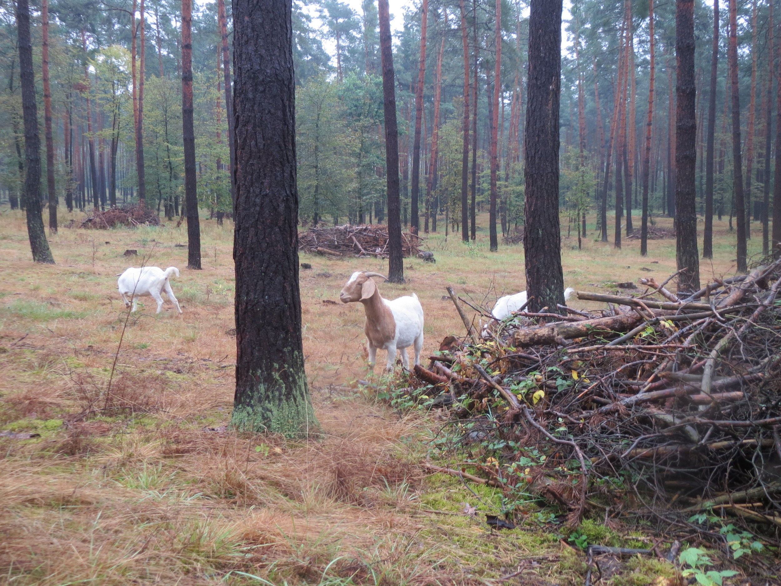 Hausziege (Capra aegagrus hircus) Auf einer Waldweide im Schwetzinger Hardt